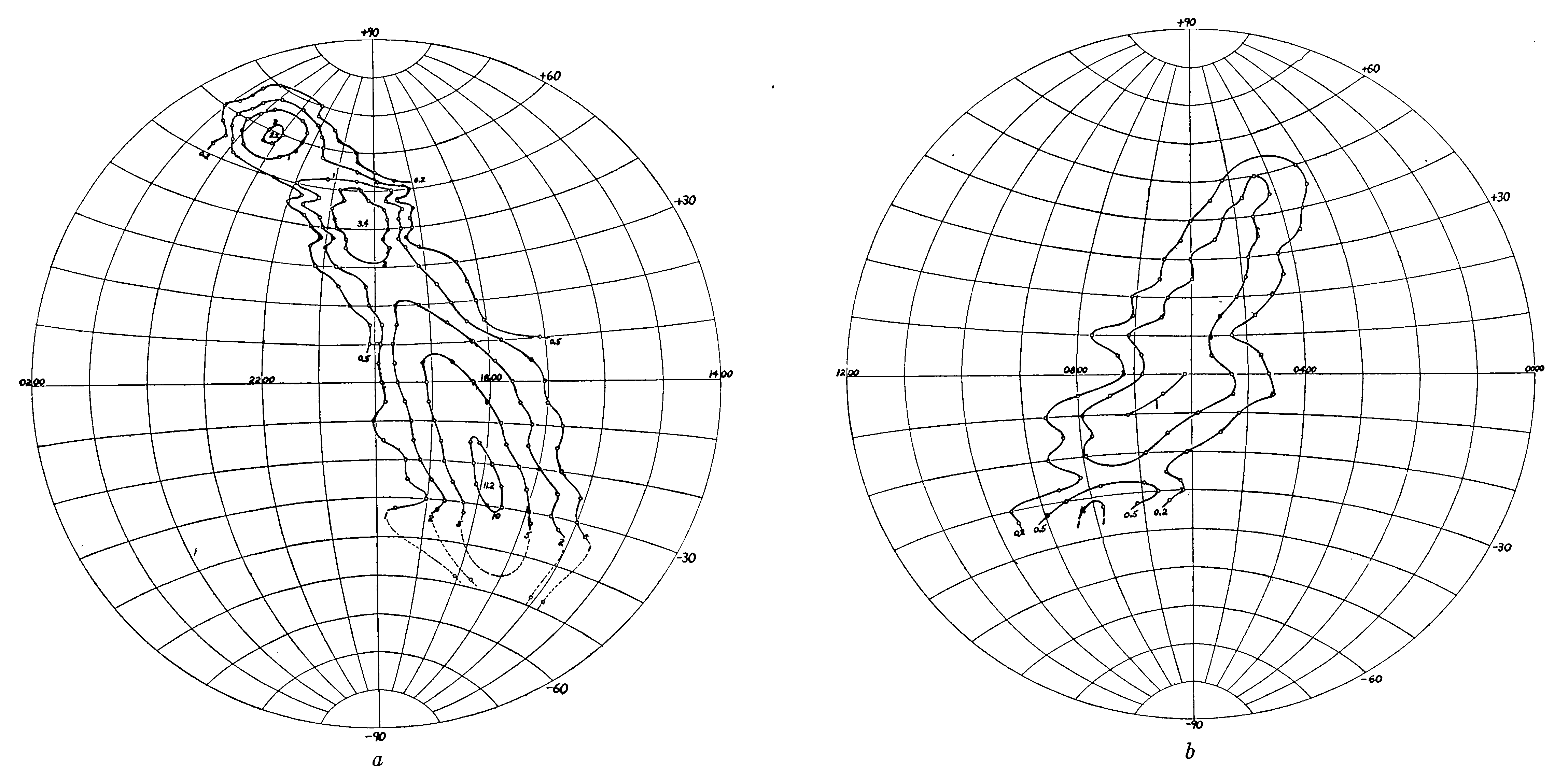 Первая радиокарта небосвода полученная Гроутом Ребером в 1944 году. Линии постоянной интенсивности в единицах измерения 10-22 Вт/см2/...